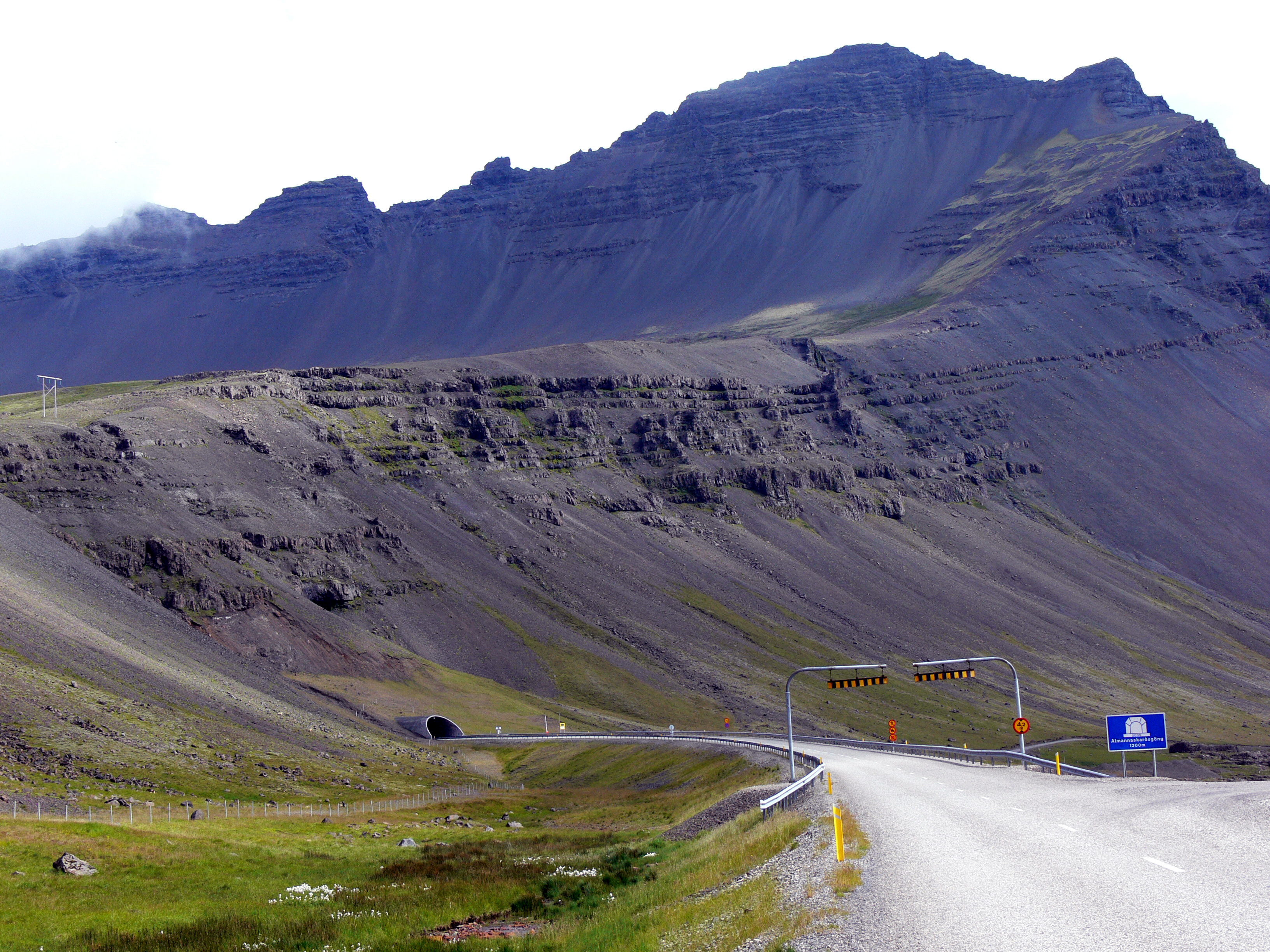 Almannaskarðsgöng auf der Seite von Papafjörður.